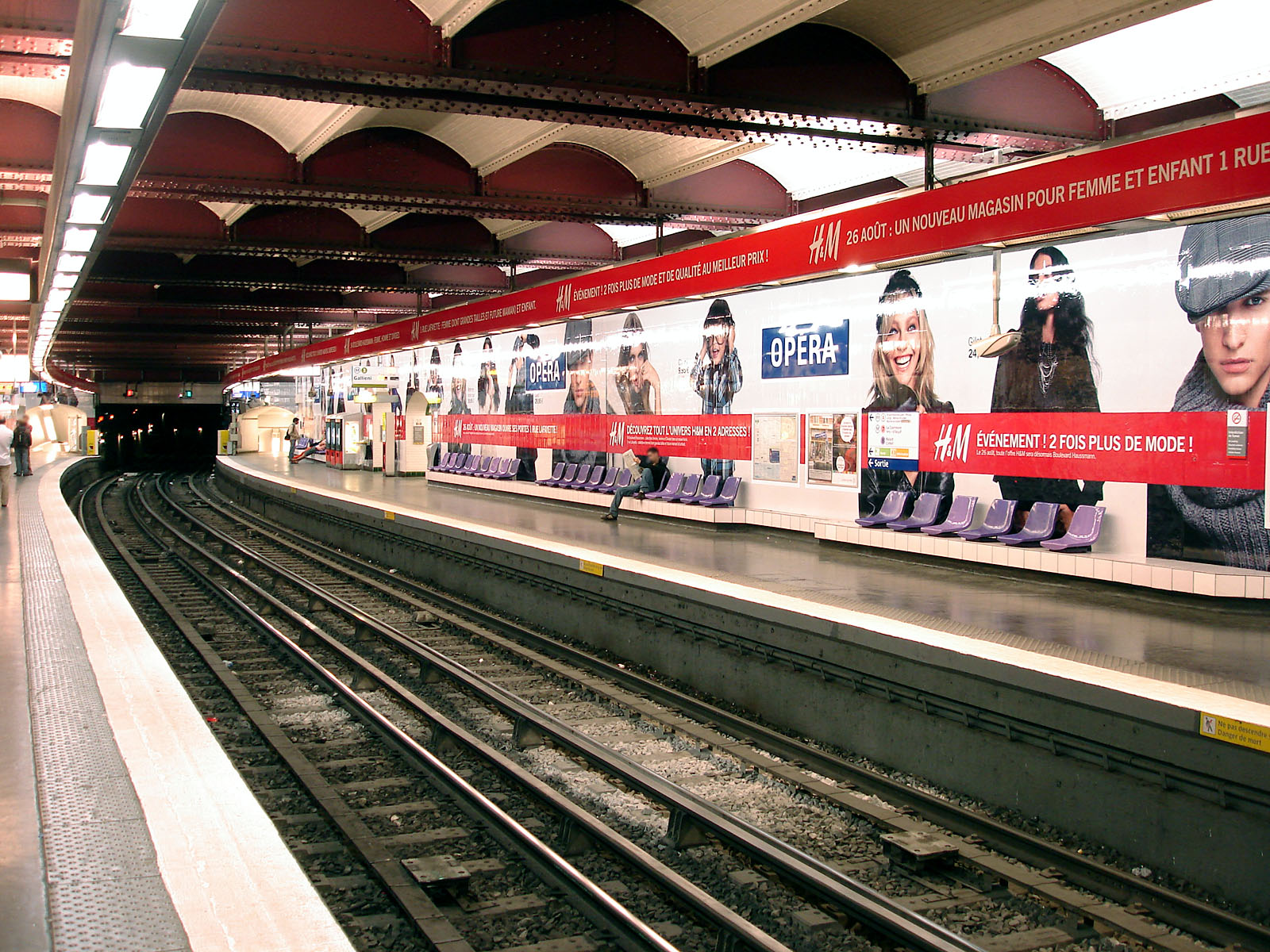 Station Opéra de la ligne 3 du métro de Paris, France.